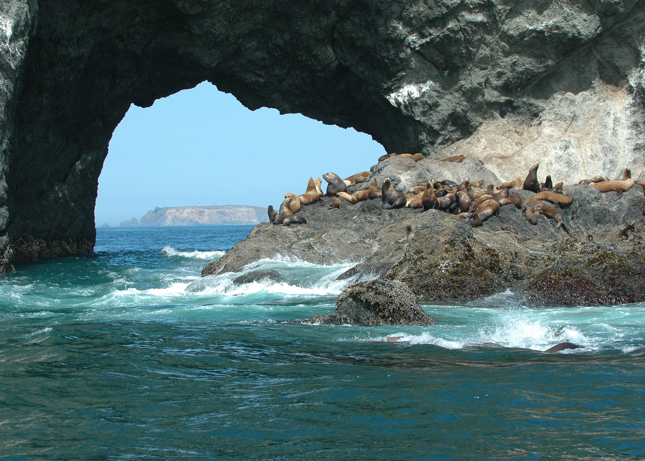 Steller sea lions Orford Reef